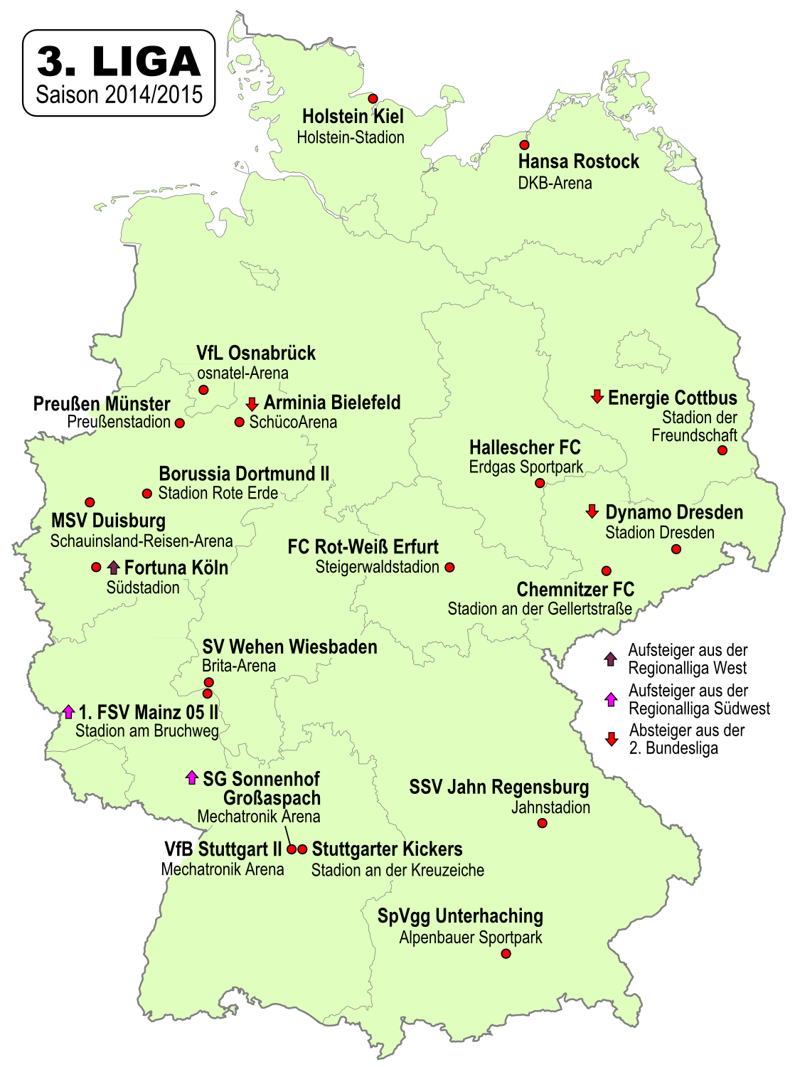 Karte der Vereine der 3. Fussball-Liga 2014/2015